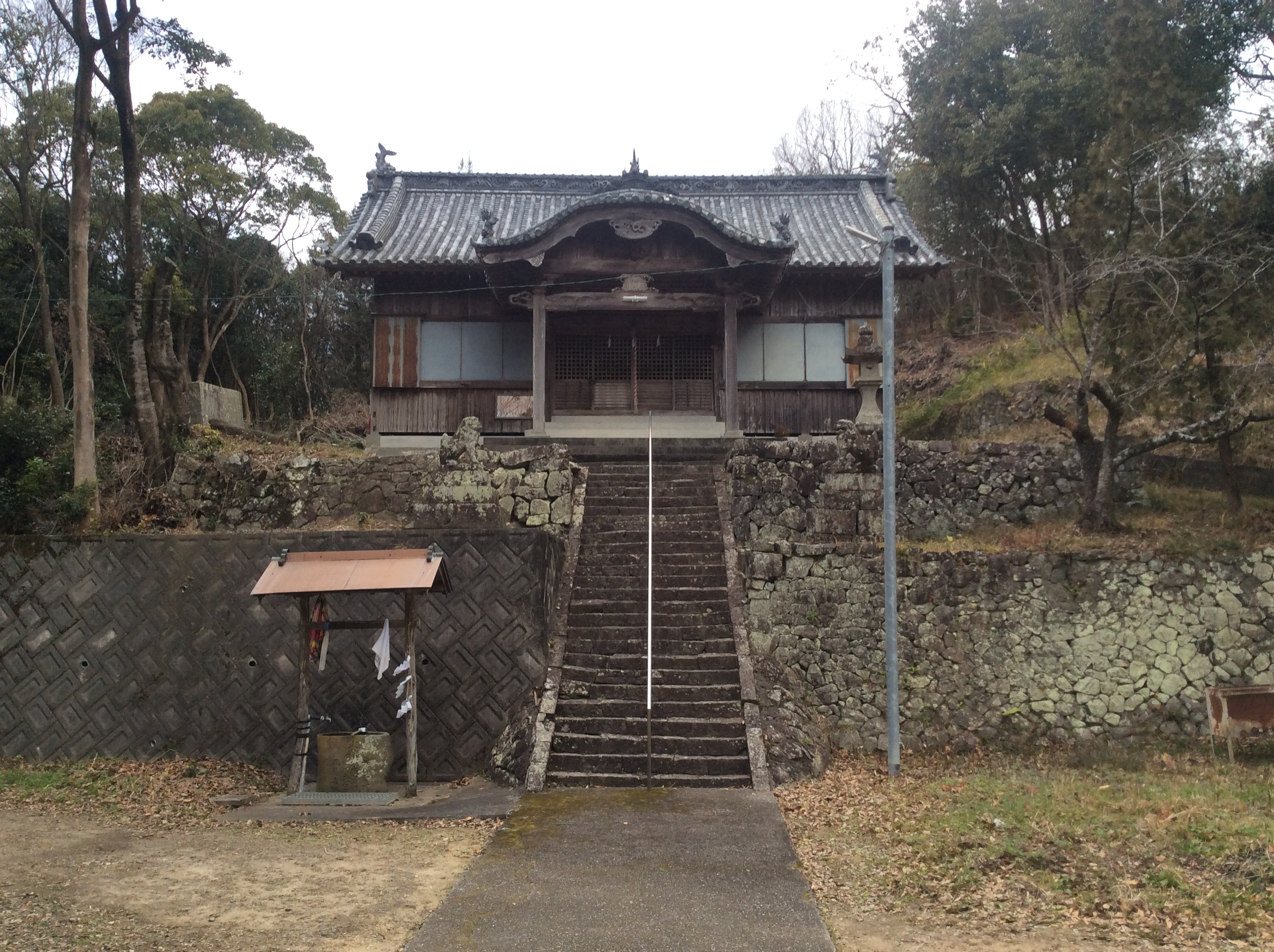 赤田神社（阿波市）